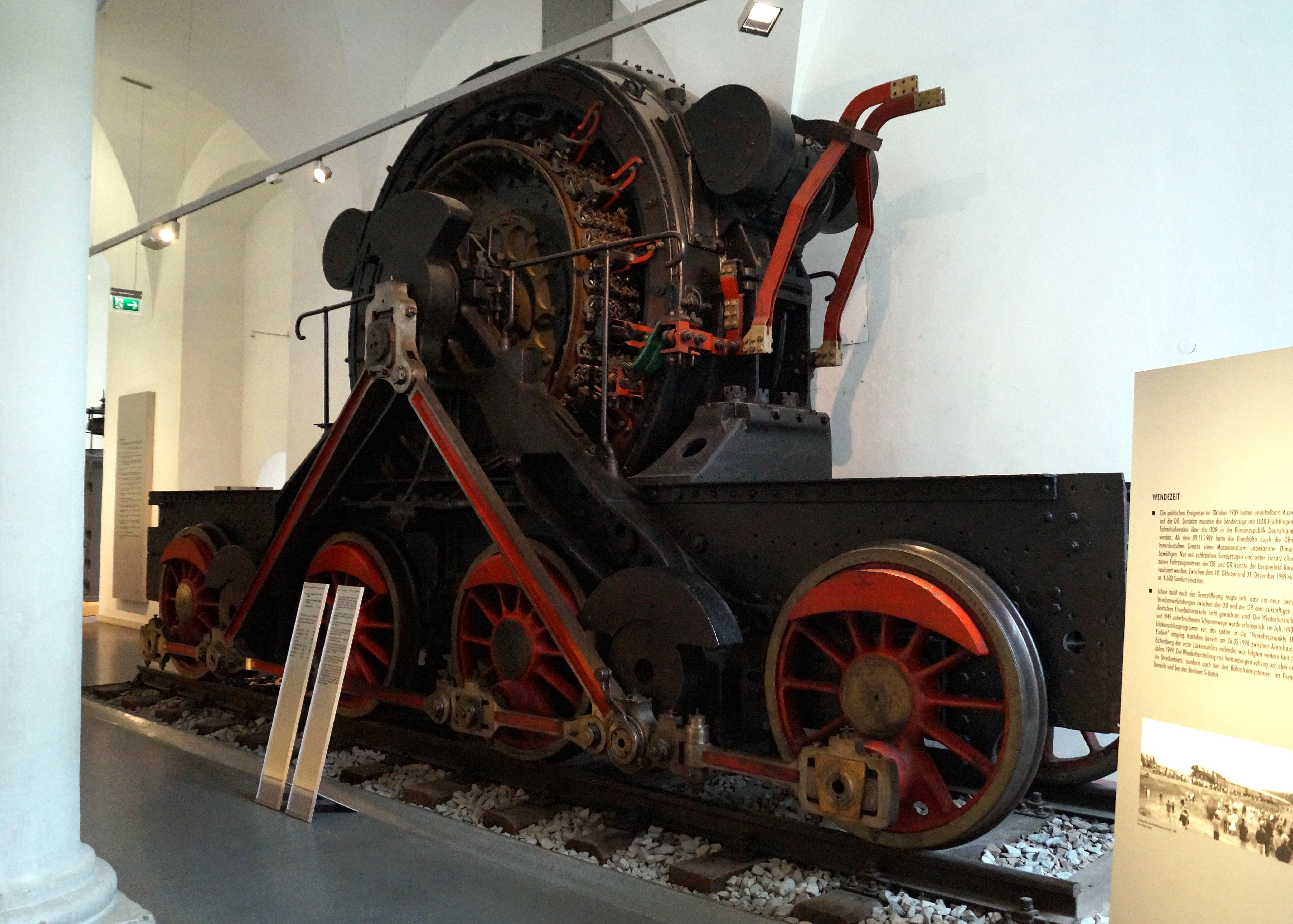 Torso einer elektr. Lokomotive für den Reisezugdienst E 5042 ex pr. EP 242 Breslau, Linke-Hofmann-Werke AG Breslau 1926